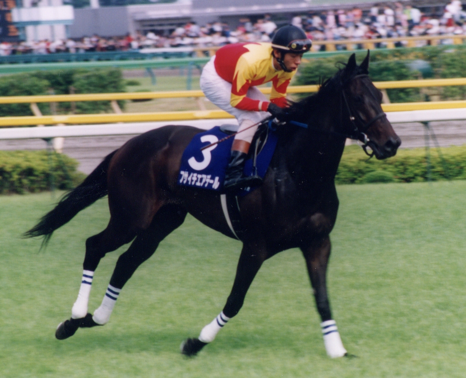 Belle Ami Lord